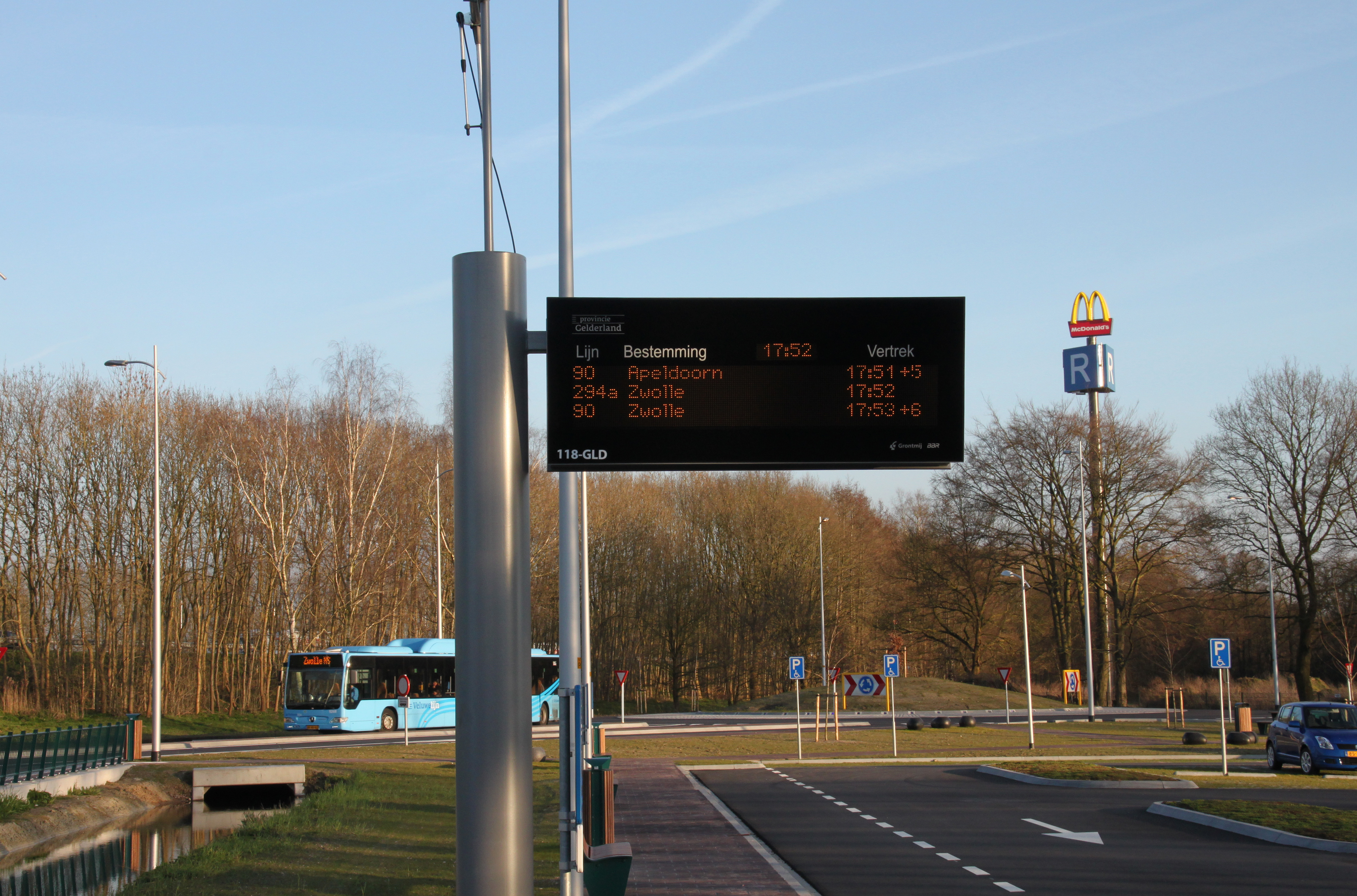 DRIS-paal bij transferium Horsthoek in Heerde aan de Veluwelijn. De Veluwelijn kent sinds de start in december 2010 met vertraging.